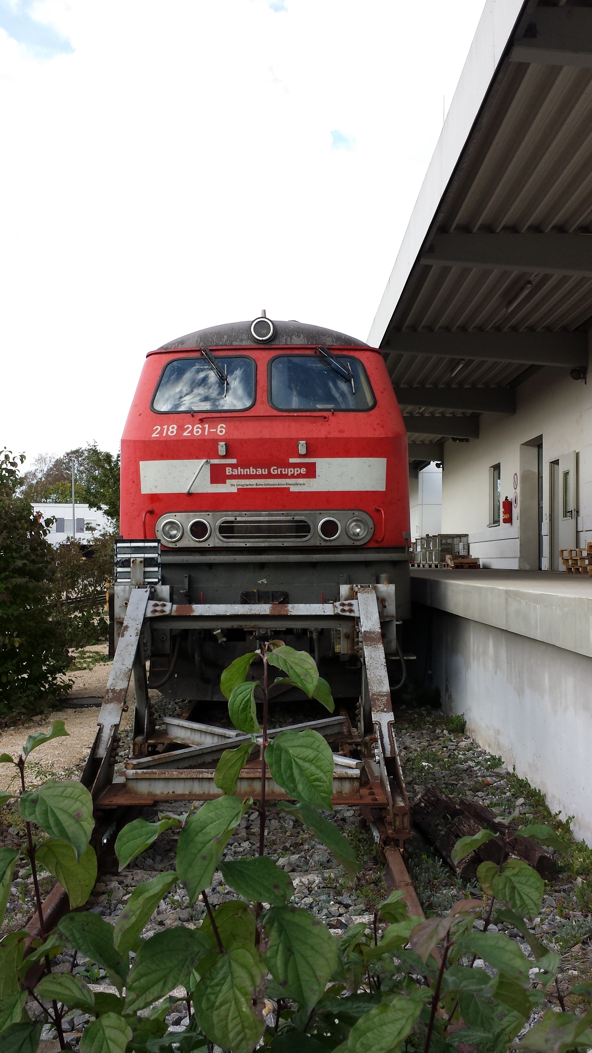 Eine Diesellok BR 218 der Bahnbau Gruppe am Augsburger Gleisbauhof.